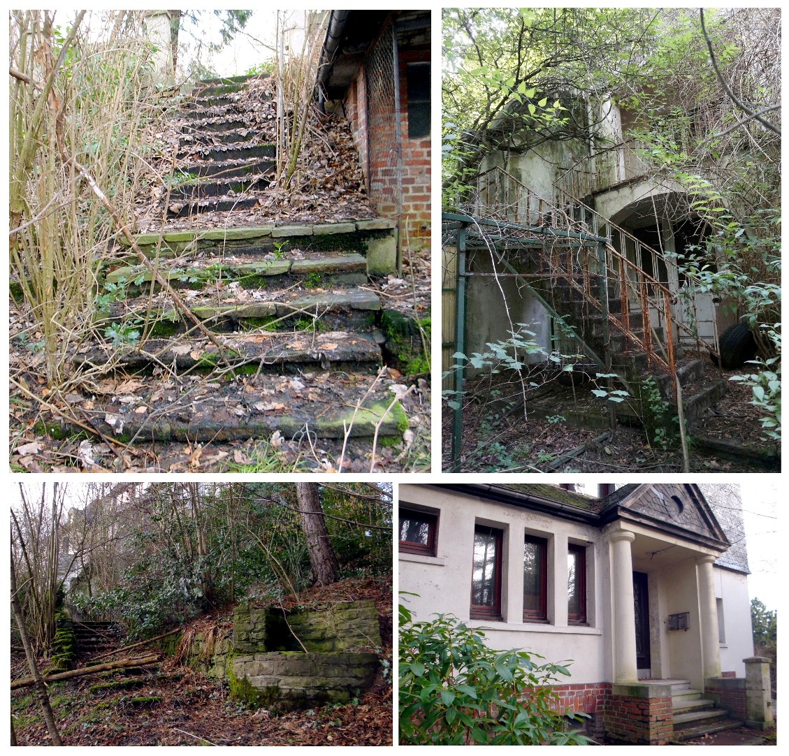 Das alte Ärztehaus, ehemals auf dem Gelände der heutigen Herzklinik Roderbirken. Inzwischen abgerissen.